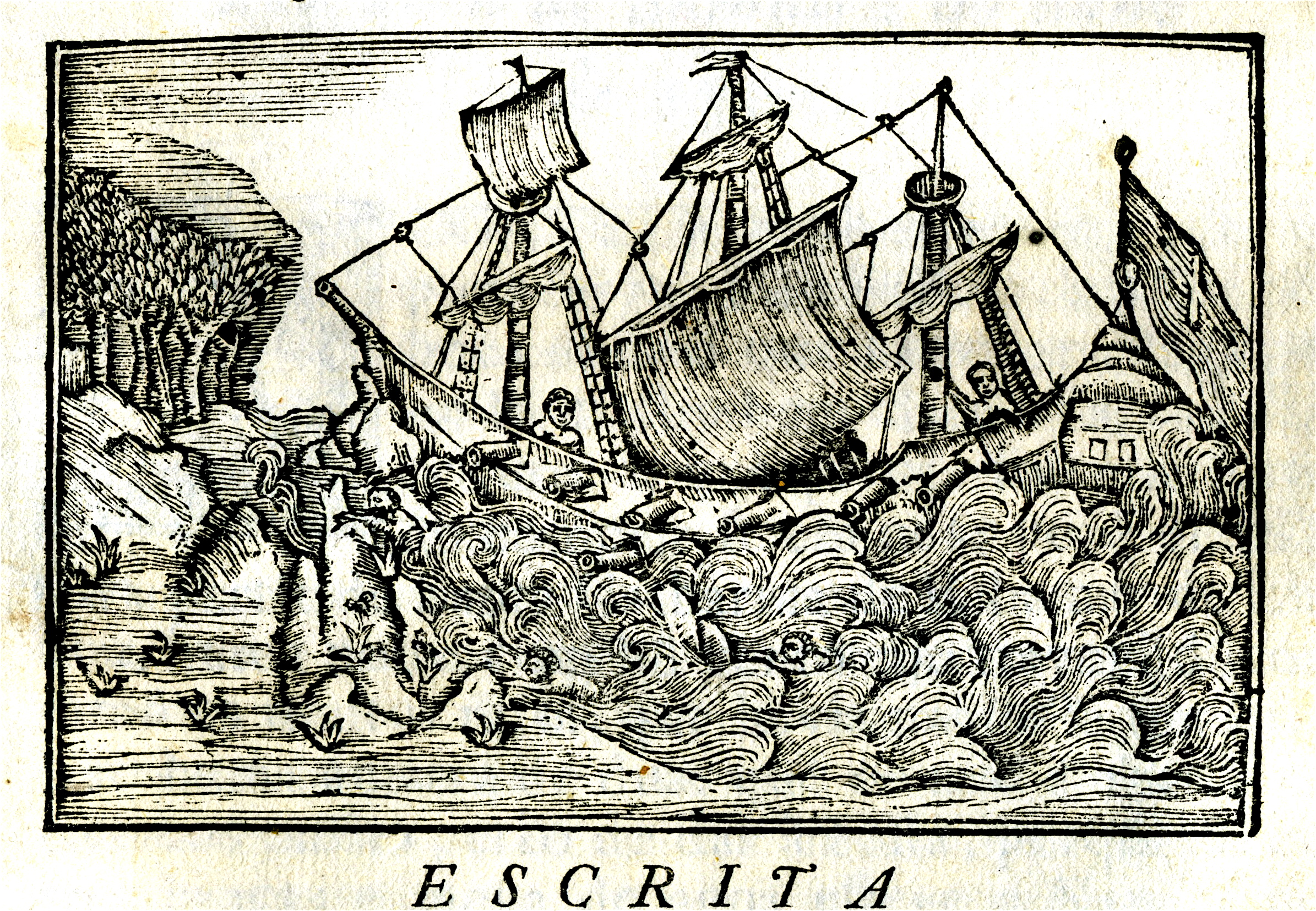 Naufrage de la nef S. Paulo, en 1560, in Bernardo_Gomes_de_Brito,_Historia_Tragico-Maritima,_tomo_1°,_p._351